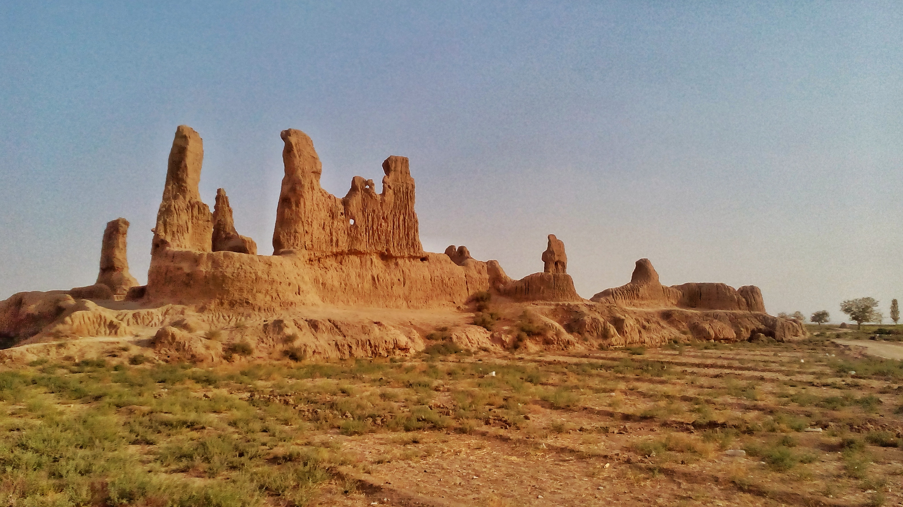 قلعه کهنه سویز